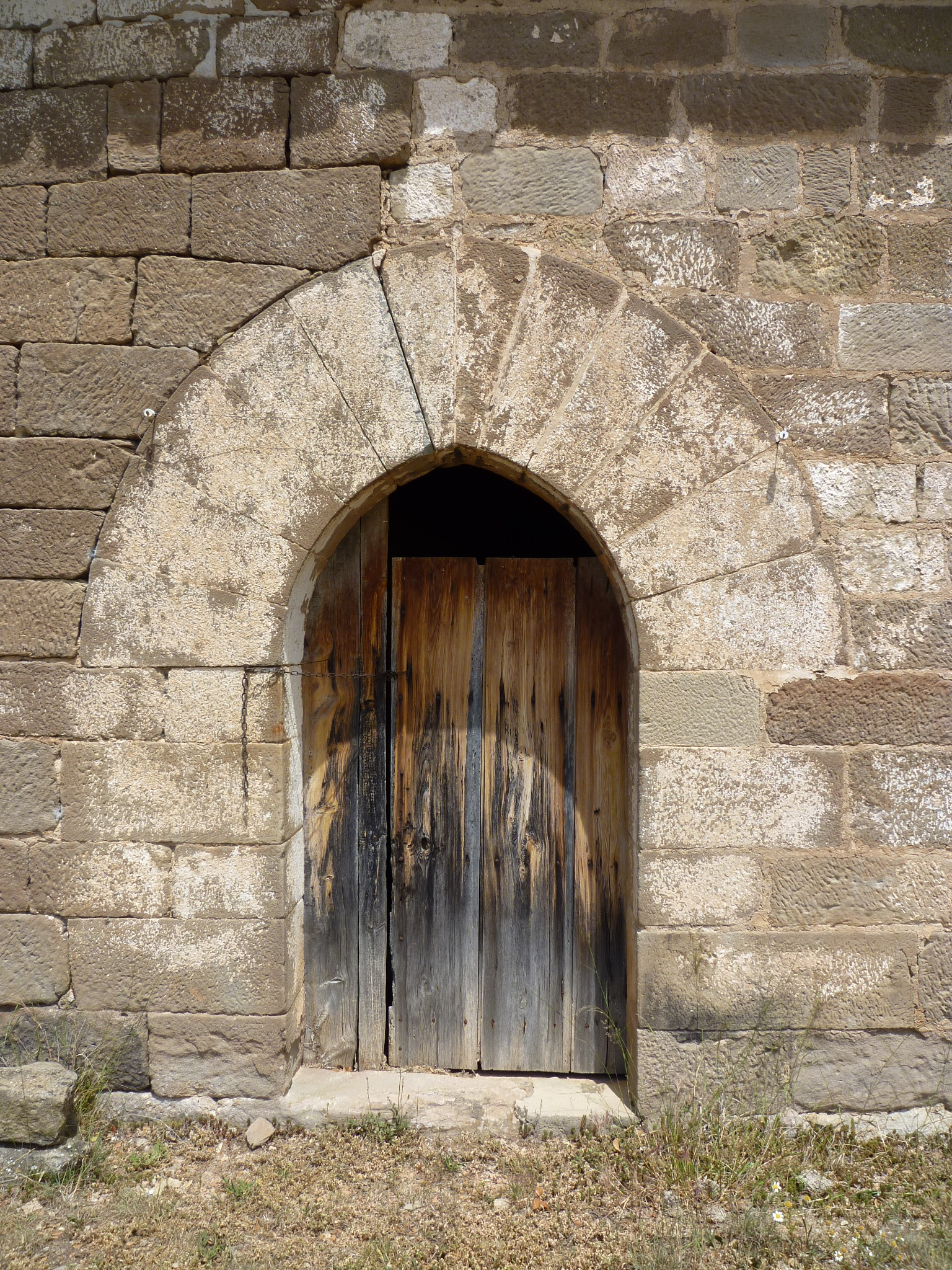 Ermita de Sant Pere de l'Alguer (Olius): portal This is a a photo of a natural area in Catalonia, Spain, with id: ES510ORA